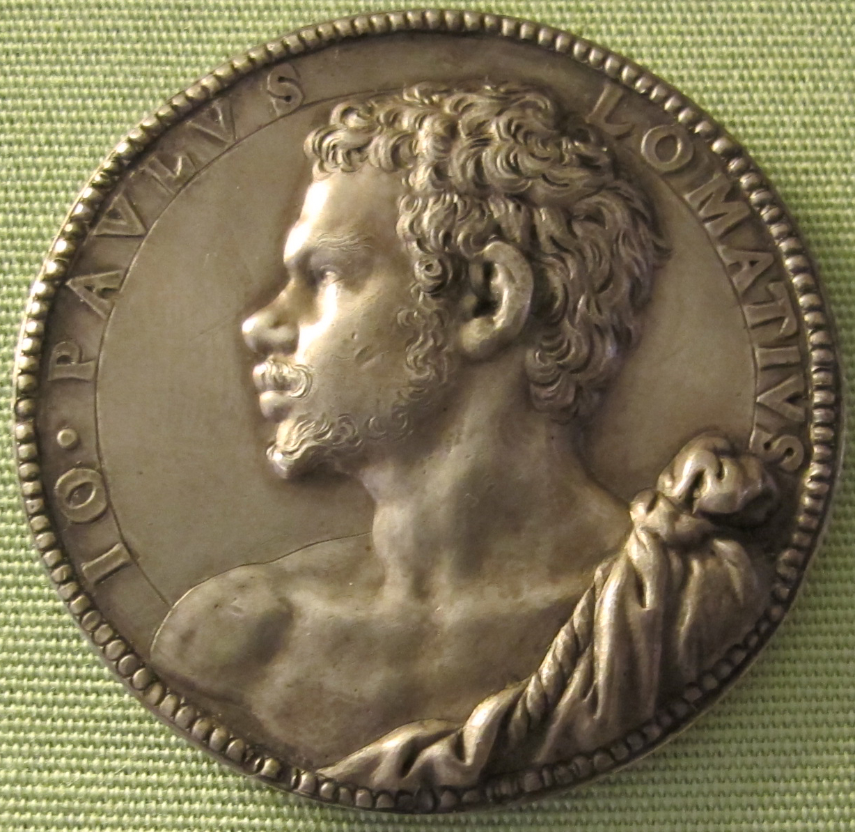 Annibale fontana, giovanni paolo lomazzo, 1559